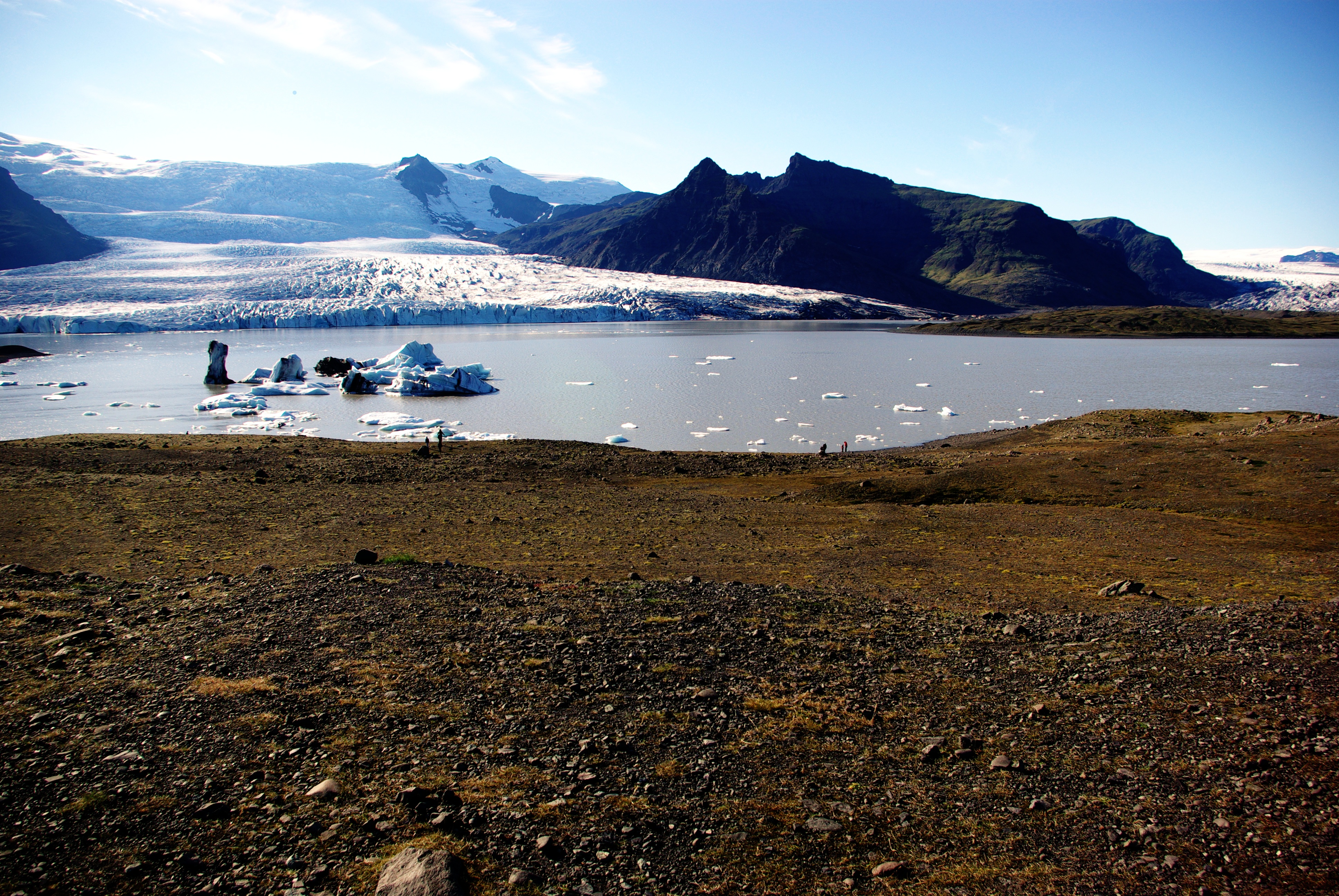 Der Fjallsarlon. Ein Gletschersee im Südosten Islands. Im Hintergrund der Fjallsjökull, eine Gletscherzunge des Öræfajökull.